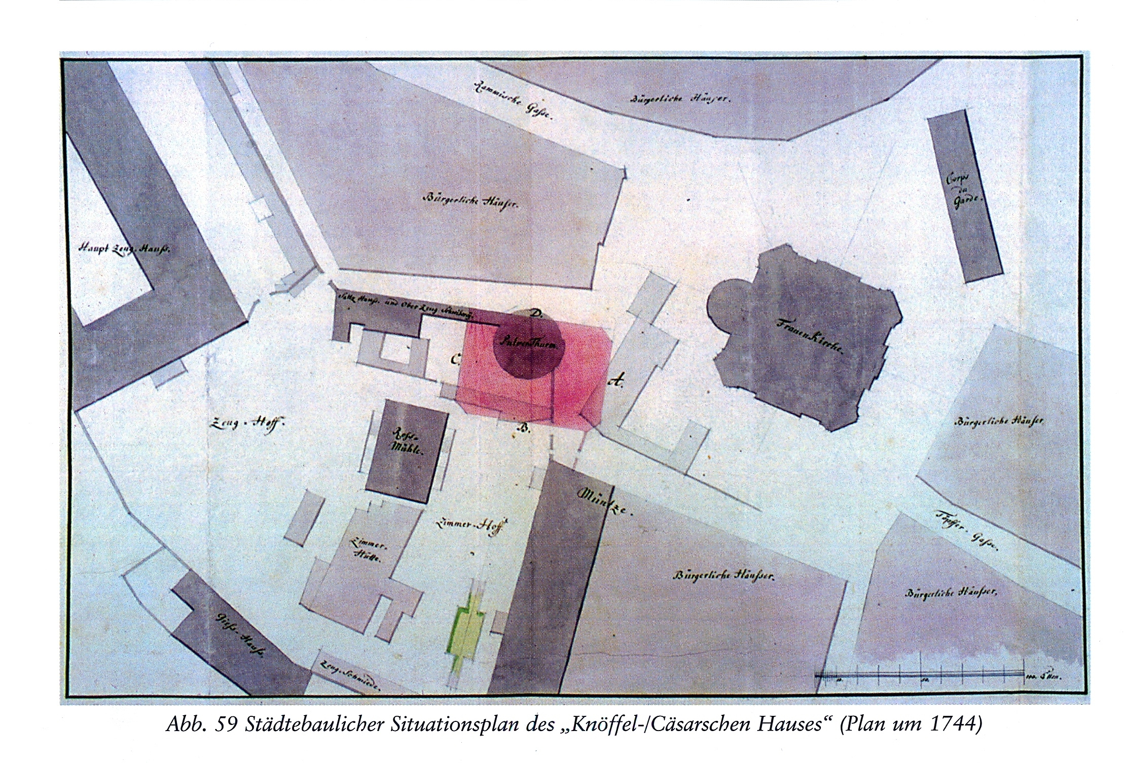 Dresden, Städtebaulicher Situationsplan des Knöffel- und Cäsarschen Hauses , Plan um 1744